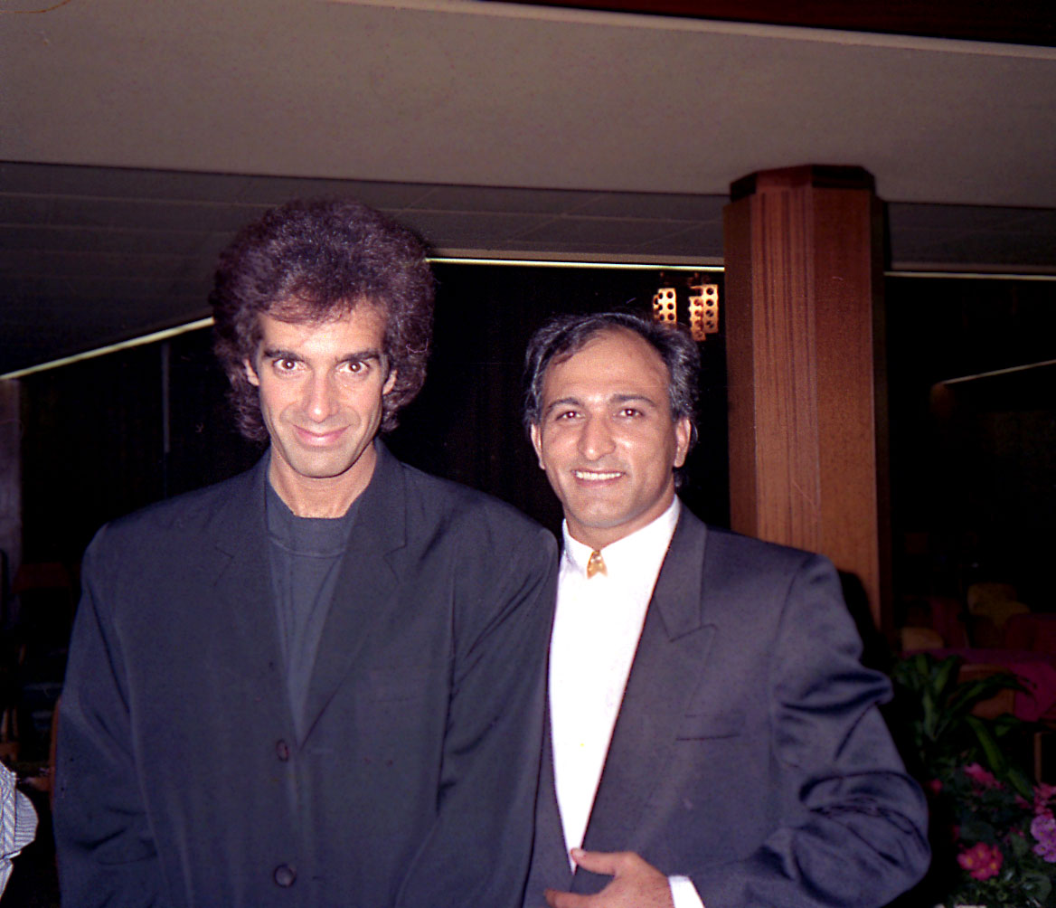 بهروز کریمی و دیوید کاپرفیلد